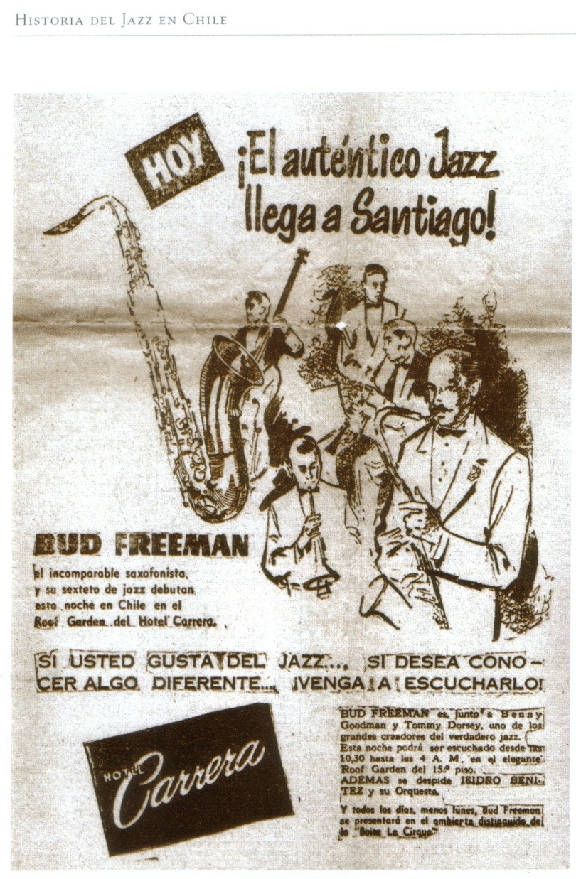 Ejemplo de Afiche de presentación del Saxofonista Bud Freeman con músicos locales, durante su estadía en Chile.